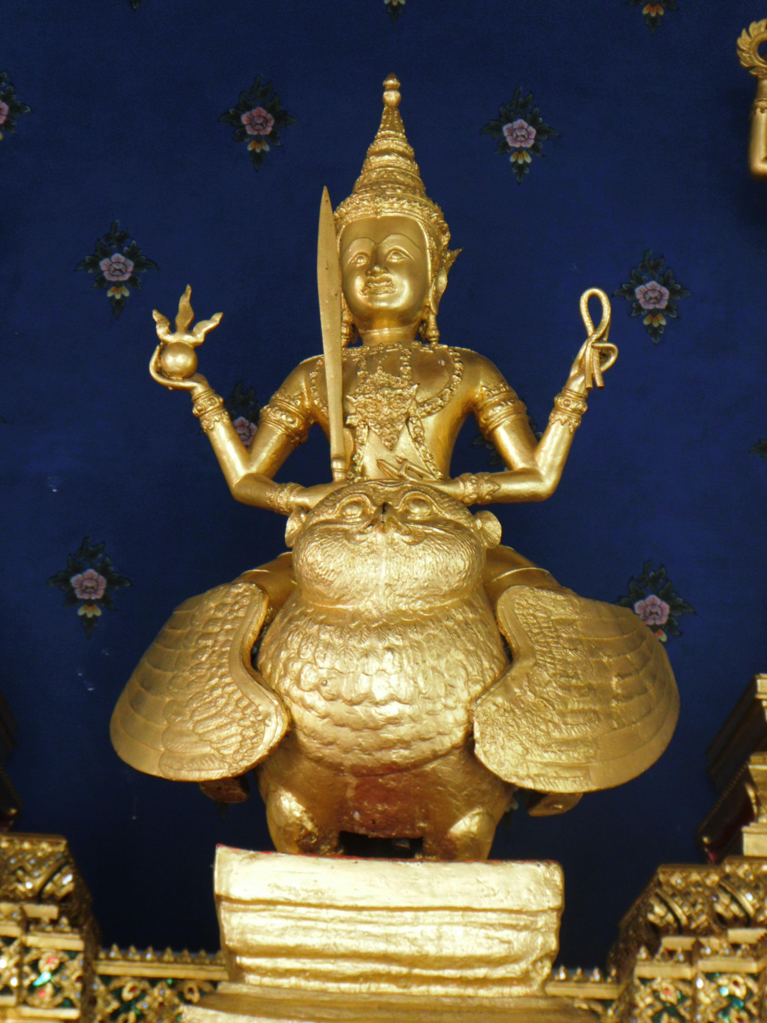 ศาลหลักเมือง